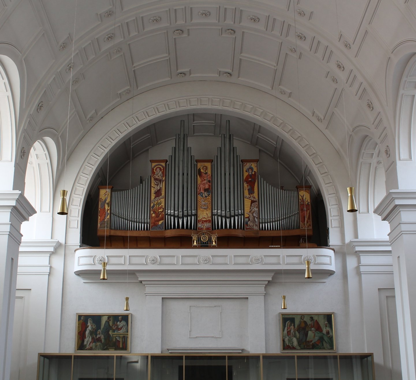 Orgel von St. Joseph in München